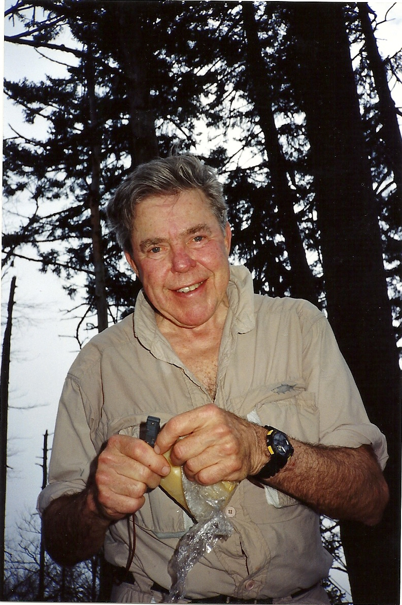 Phil Hanes in Alaska